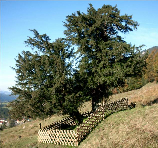 Alte Eibe von Balderschwang, von der Ostseite fotografiert